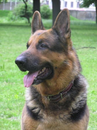 wrocławski owczarek niemiecki